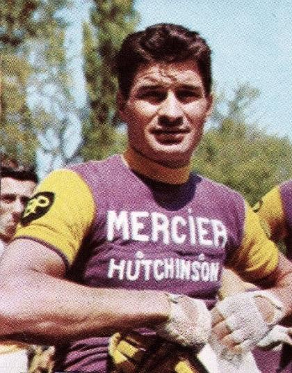 Raymond Poulidor en 1966 - PANINI 1966/1967, n°242.